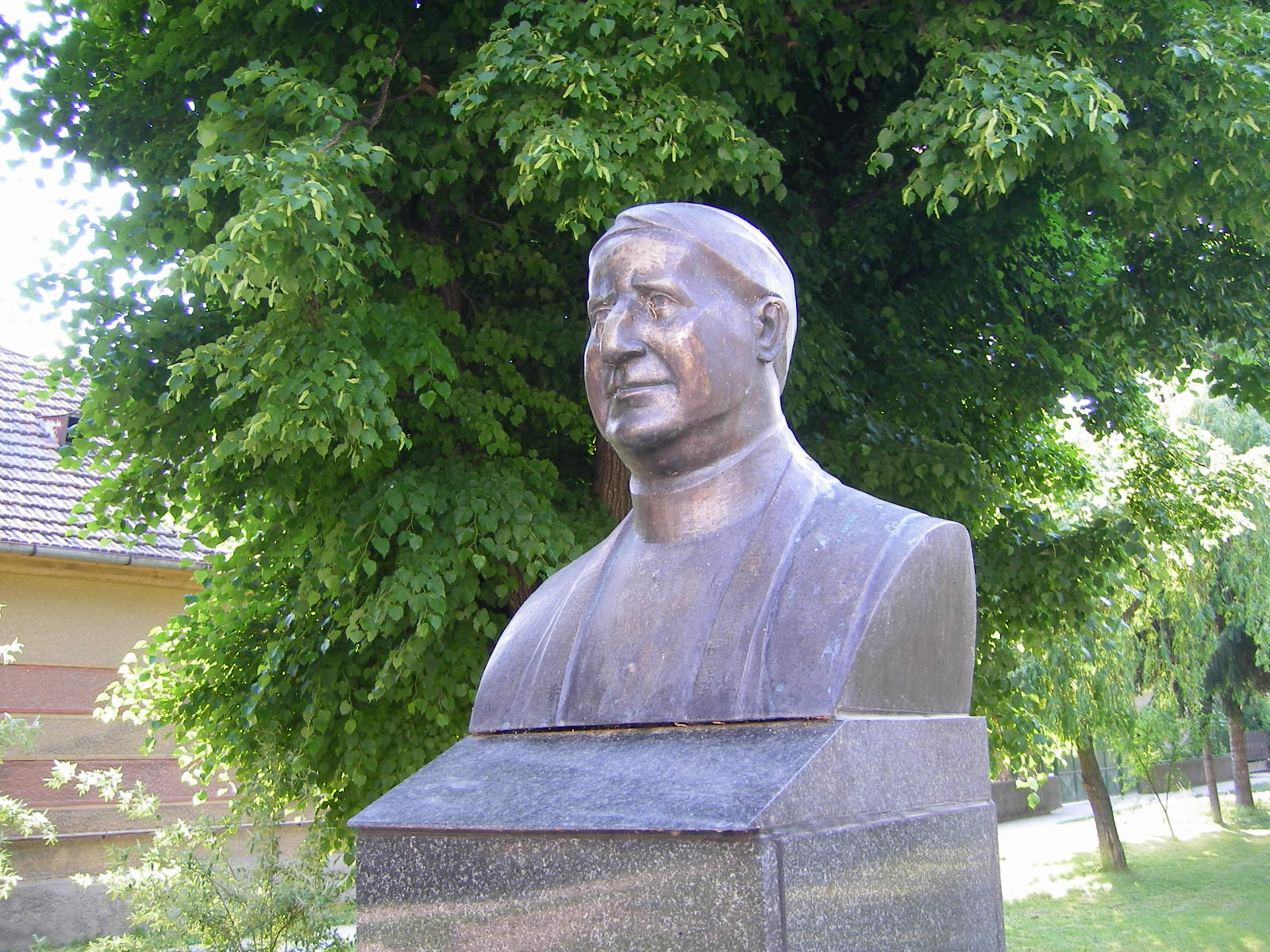 Szímő - Jedlik Ányos mellszobra